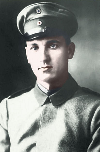 Jääkäri Väinö Lahja Rikhard Vähätupa.